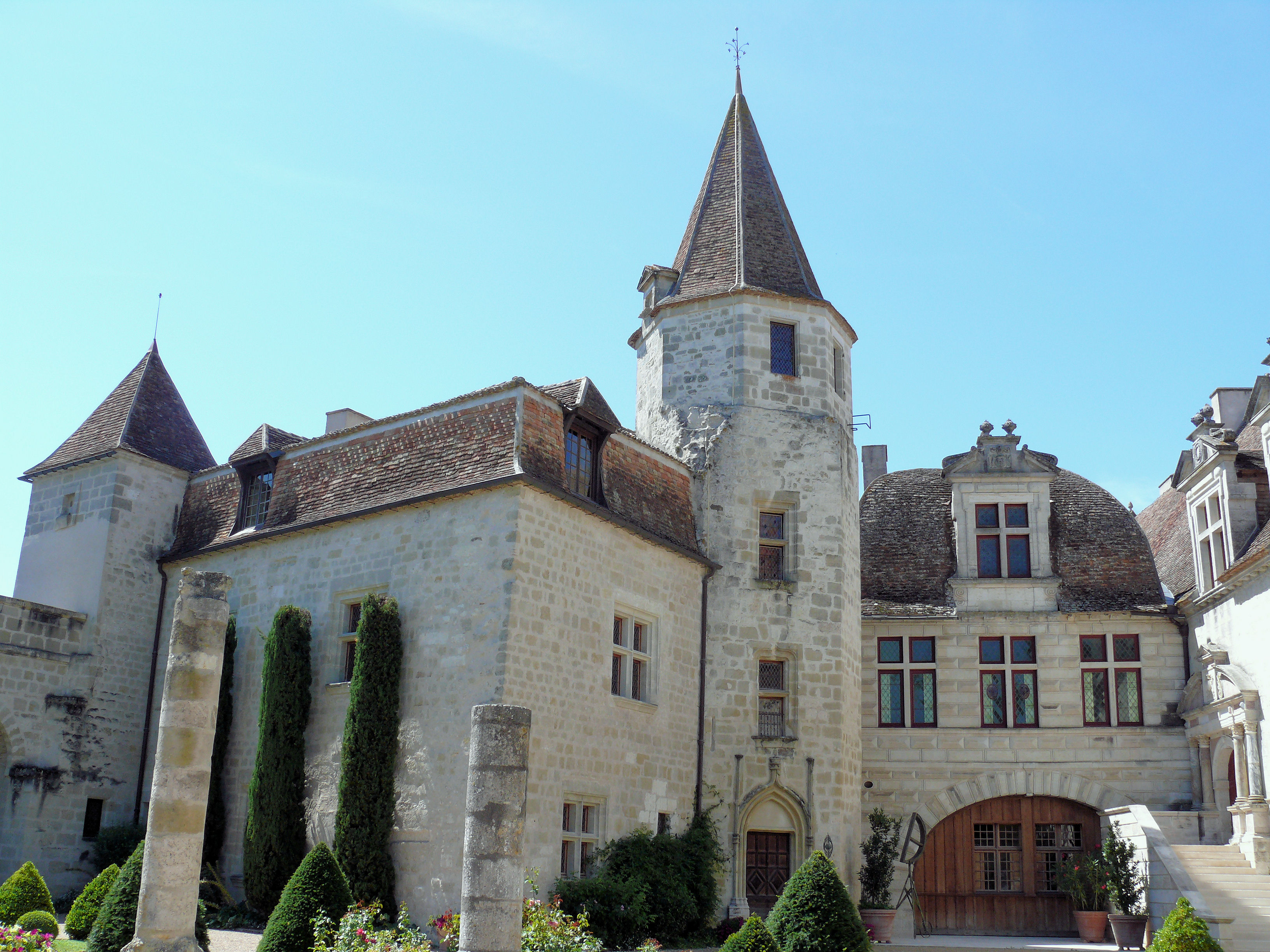 Lauzun - Château